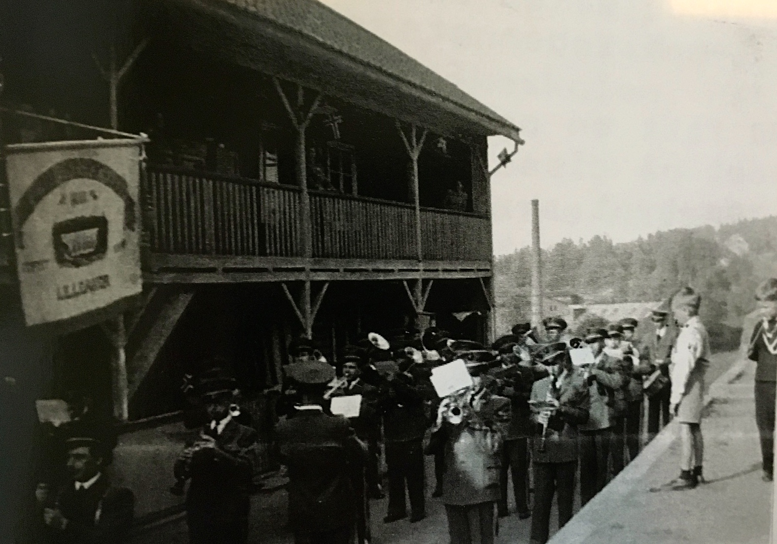 Midtgård - kalt "Bikuben" på folkemunne, fordi her bodde 180 mennesker fordelt på 26 leiligheter, var den første arbeiderbolig som Mustad bygget.